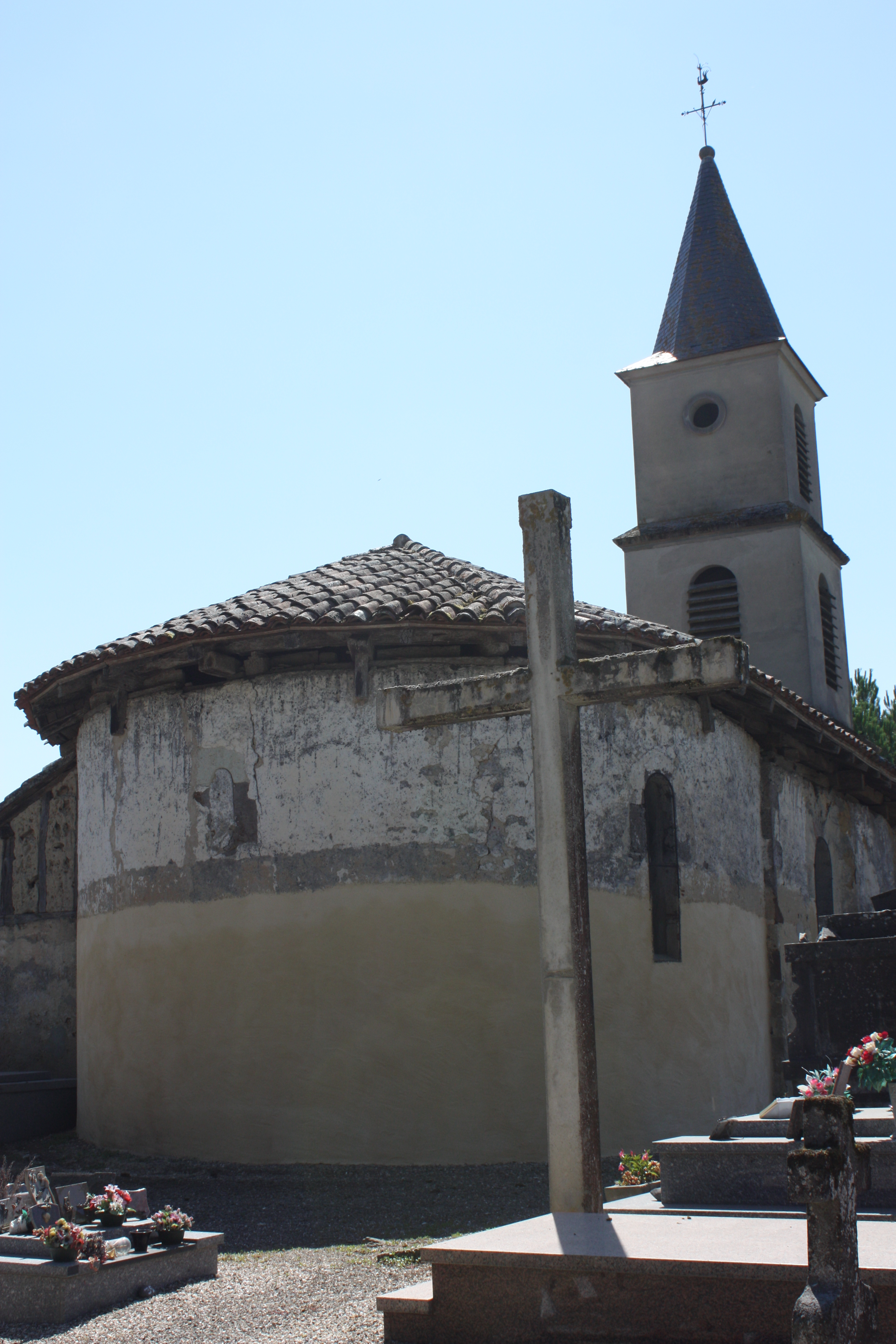 Noulens - Eglise Saint-Jean-Baptiste